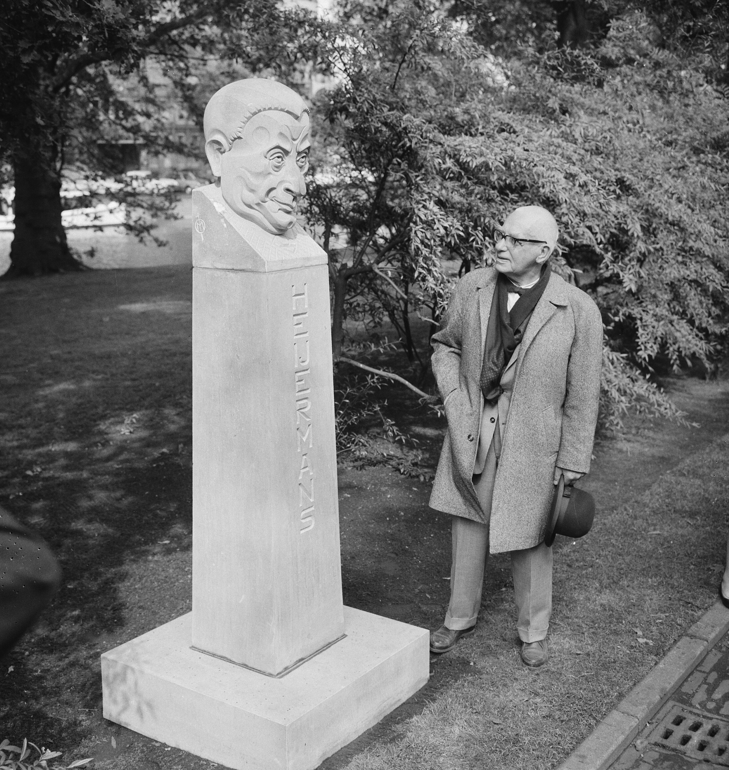 Collectie / Archief : Fotocollectie Anefo Reportage / Serie : [ onbekend ] Beschrijving : Monument Herman Heijermans weer op het Leidse Bosje, beeldhouwer Hildo Krop verrichtte de onthulling Datum : 1 juni 1964 Locatie : Amsterdam, Noord-Holland Trefwoorden : beeldhouwers, monumenten, onthullingen Persoonsnaam : Heijermans, Herman, Krop, Hildo Fotograaf : Nijs, Jac. de / Anefo Auteursrechthebbende : Nationaal Archief Materiaalsoort : Negatief (zwart/wit) Nummer archiefinventaris : bekijk toegang 2.24.01.03 Bestanddeelnummer : 916-4957